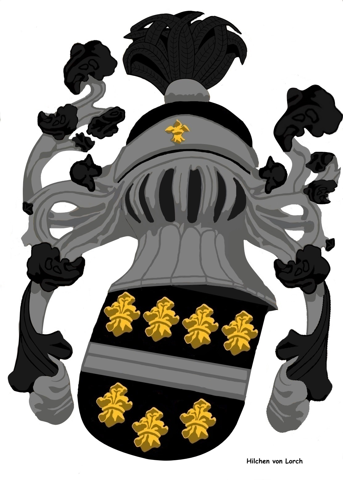 Familienwappen der Hilchen von Lorch (Adelsgeschlecht)